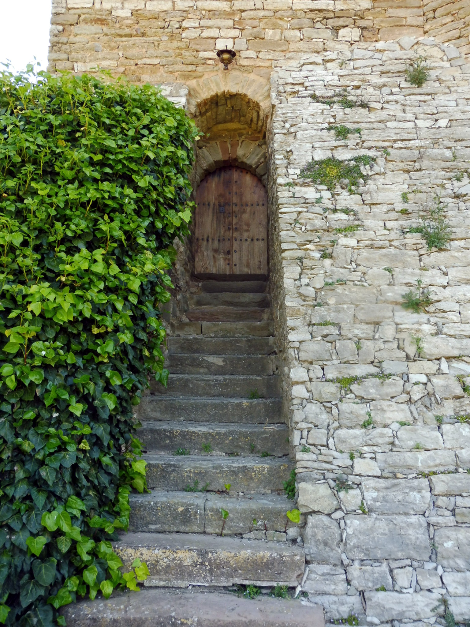 Església de Sant Cristòfol de Figuera (Sant Mateu de Bages): escales d'accés a la porta d'entrada